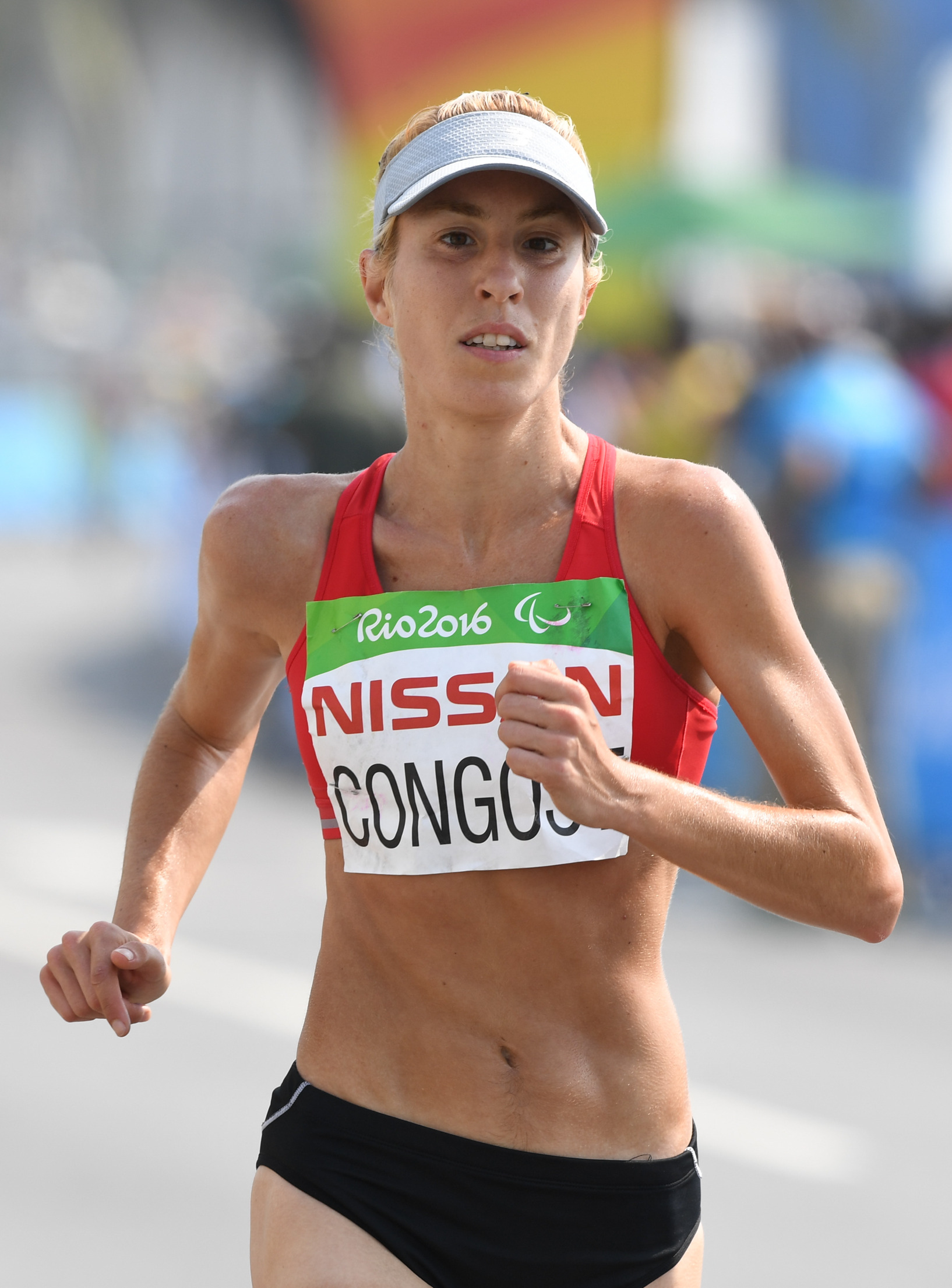 Rio de Janeiro - A espanhola, Elena Congost conquistou o bronze na classe T12 na Maratona Paralímpica T12 e T46, na praia de Copacabana (Tânia Rêgo/Agência Brasil)